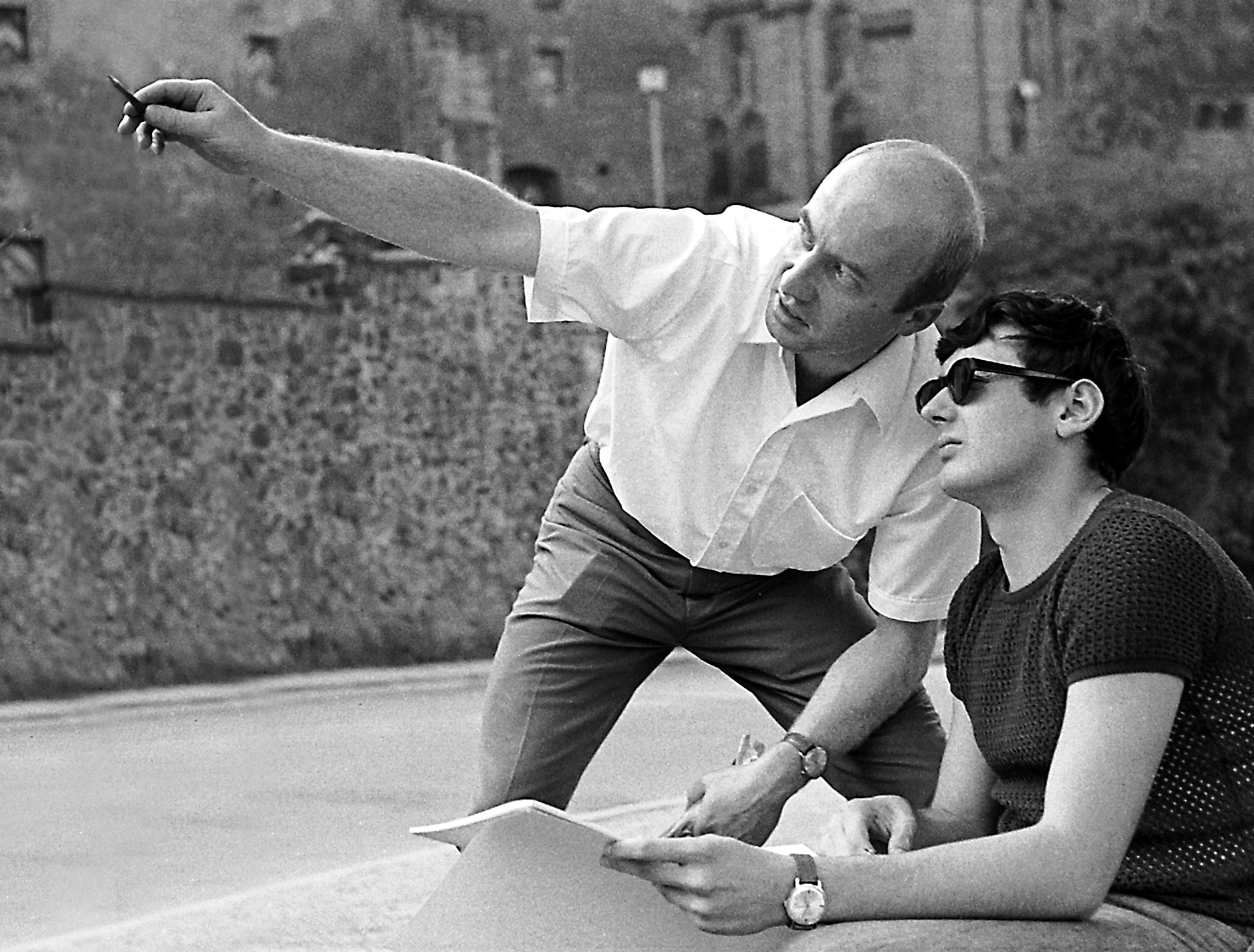 31.08.1970 Görlitz: Dozent Dr. Karlheinz Georgi von der Technischen Universität Dresden unterweist einen Architekturstudenen des Studienjahrganges 1969 im Fach Freihandzeichnen. Zeichenexkursion im 3. Semester vom 31.08. - 02.09.1970. [F19700831A]19700831120NR.JPG(c)Blobelt